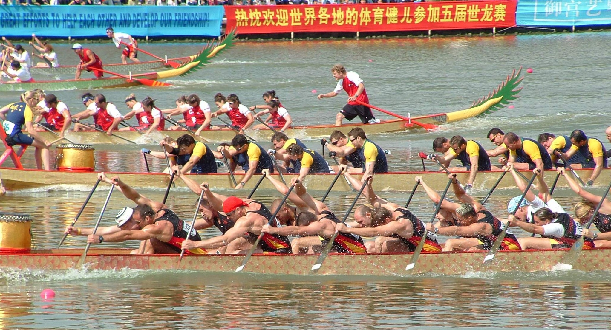 Dragon boat WM Finale 2004 Mixed 200m, All Sports Team Hannover wins Silver.